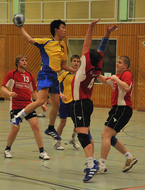 Wurfszene in einem Handballspiel des TVM 2008 gegen Murrhardt